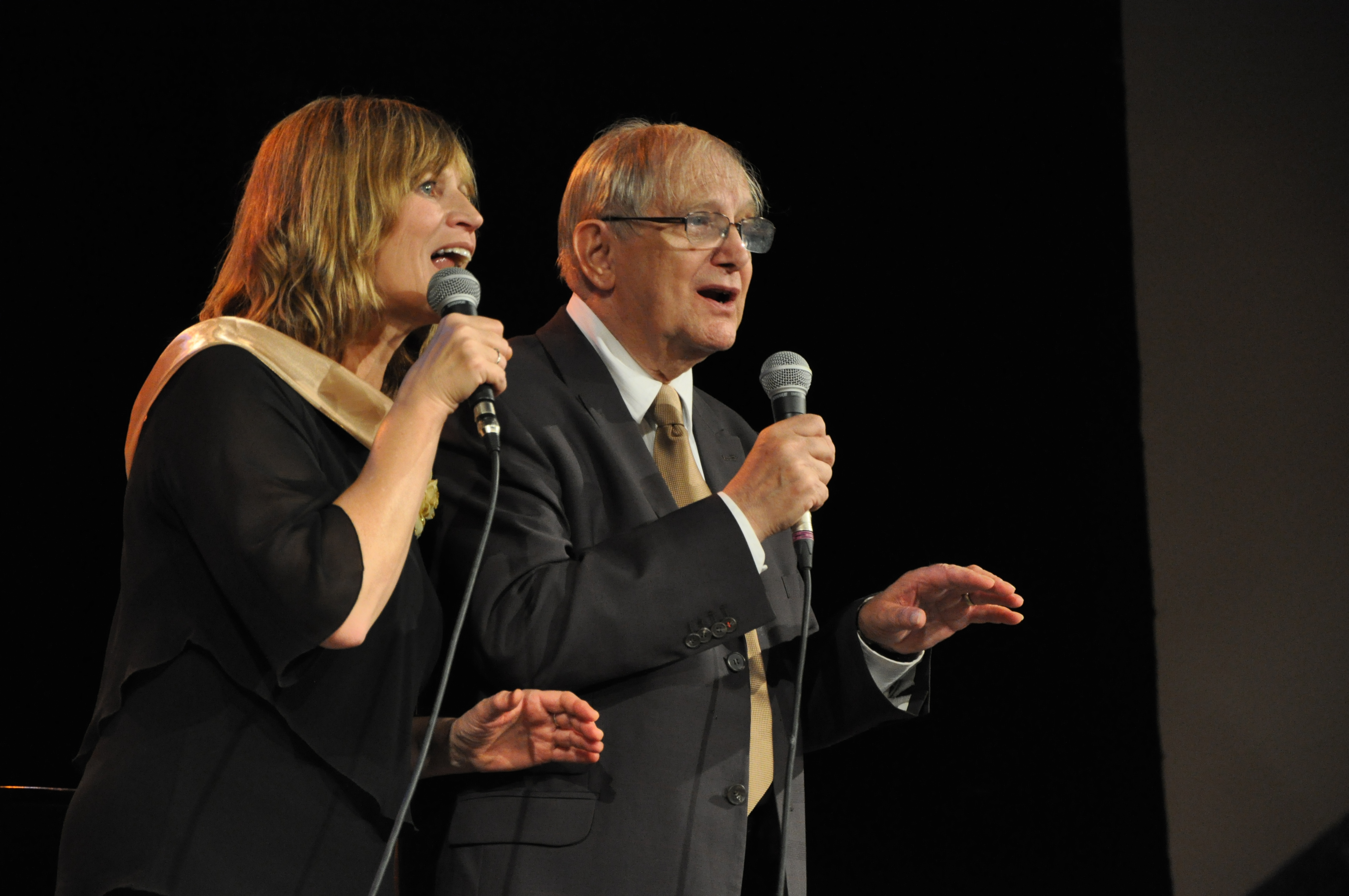 Jiří Suchý, Czech actor and Jitka Molavcová, Czech actress